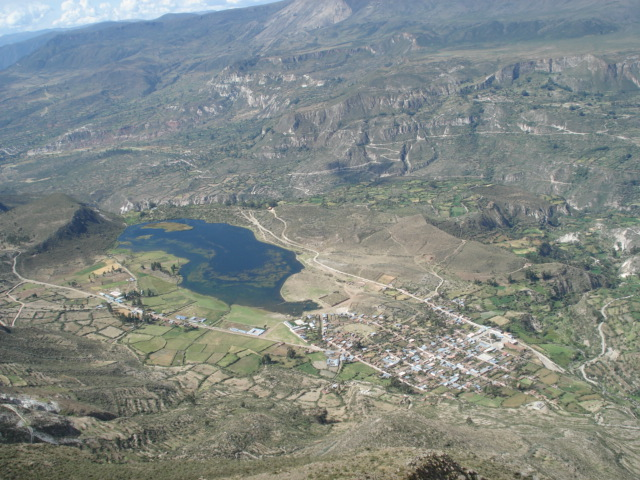 Foto de Aucará